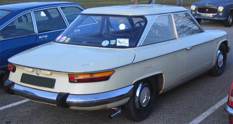 Photographie personnelle d'une berline Panhard 24 BT prise au salon Epoqu'Auto à Lyon en Novembre 2006.